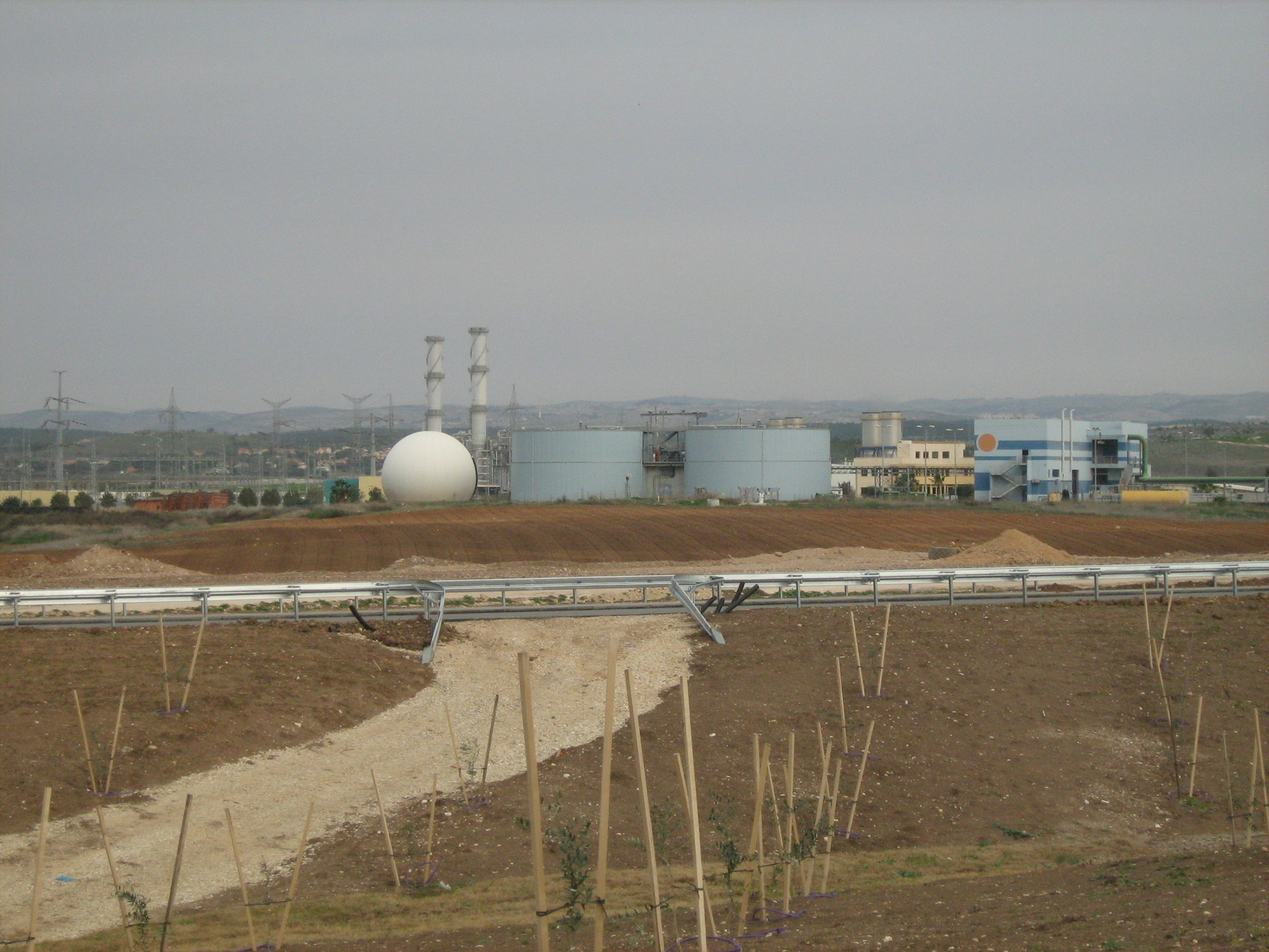 מט"ש איילון